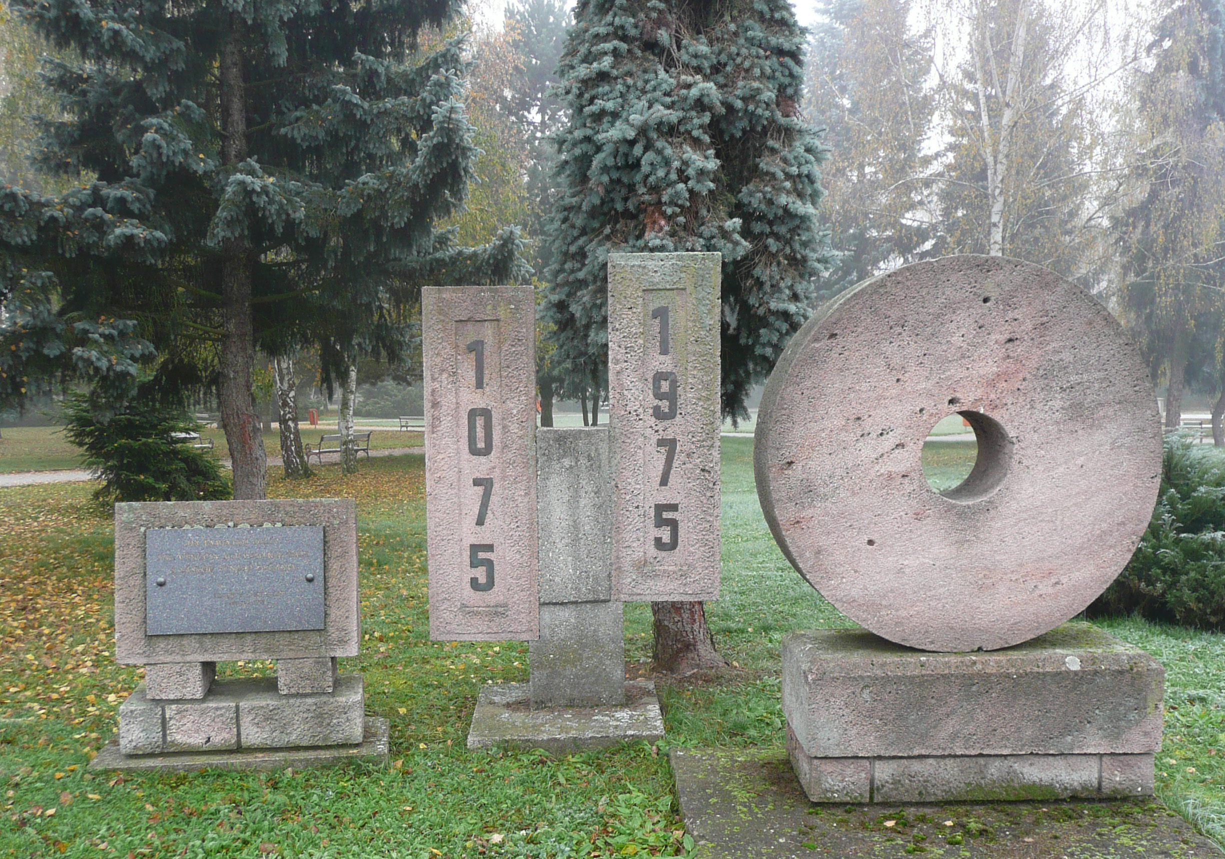 Pamätník k prvej písomnej zmienke o obci